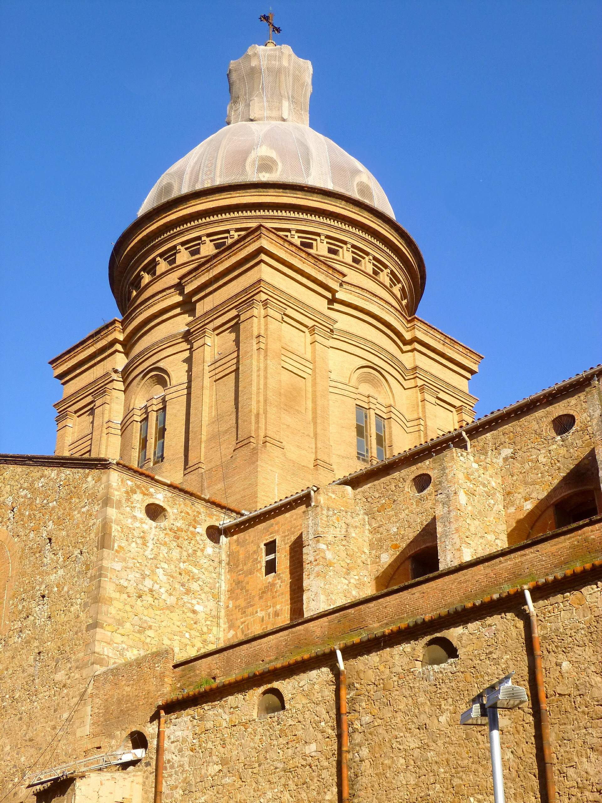 Barcelona - Iglesia de Sant Andreu del Palomar